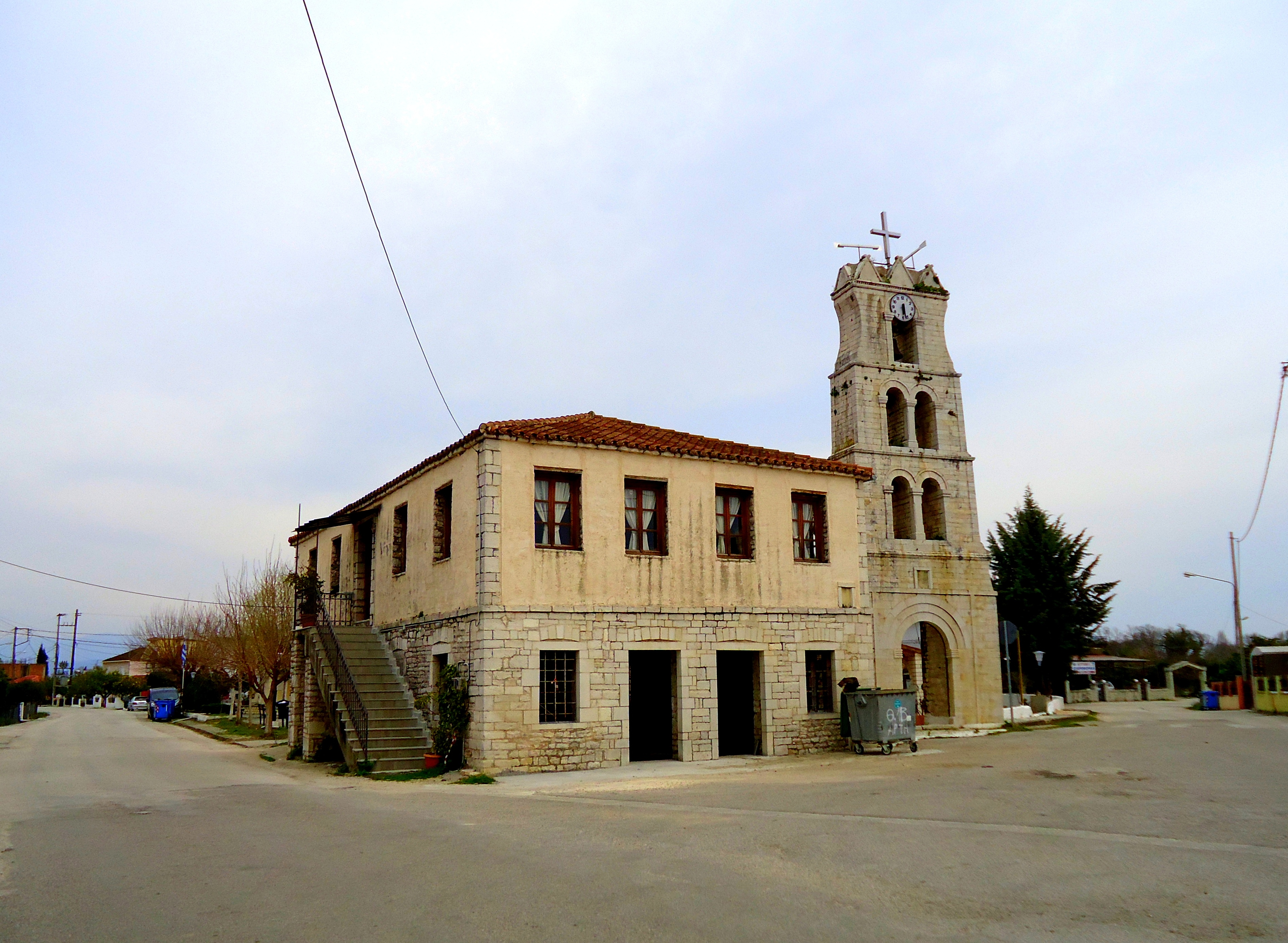 Το παλαιό αλληλοδιδακτικό σχολείο στην Ανέζα Άρτας, δίπλα στο ναό του Αγίου Νικολάου, στο οποίο, τον 19ο αιώνα, δίδασκε ένας δάσκαλος και φοιτούσαν περίπου 180 μαθητές από τη Γαβριά, το Μύτικα, την Ανέζα, το Απόμερο και το Καλογερικό.